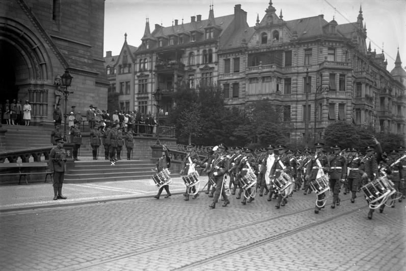 Beginn der Rheinlandräumung durch die Engländer! Der letzte grosse Gottesdienst der englischen Besatzungstruppen in der Ringkirche in Wiesbaden. Parade der englischen Truppen in Wiesbaden vor dem englischen Befehlshaber General Sir William Thuraites.